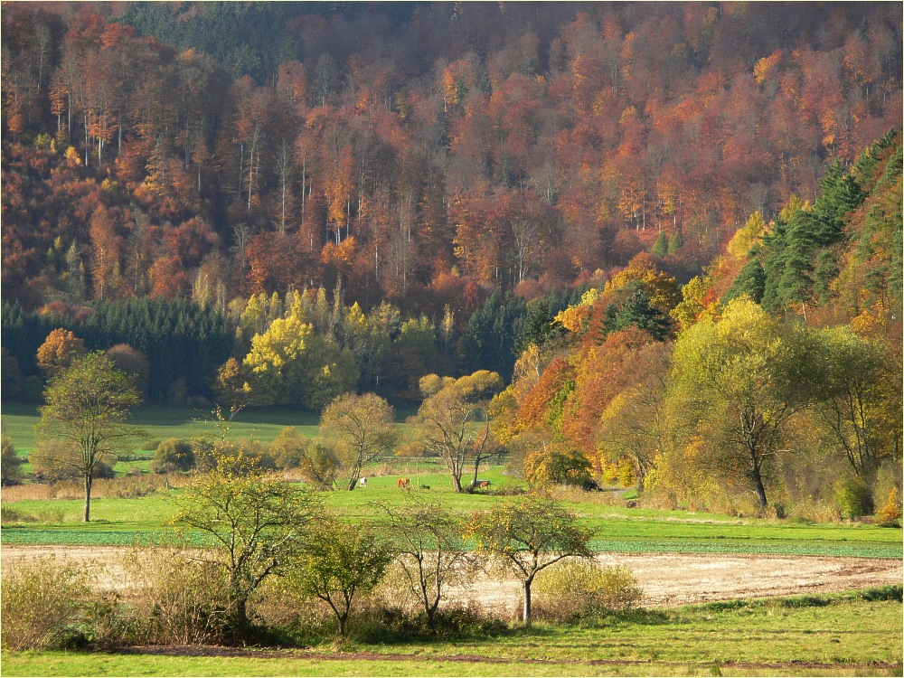 Wesertal und Reinhardswald im Herbst